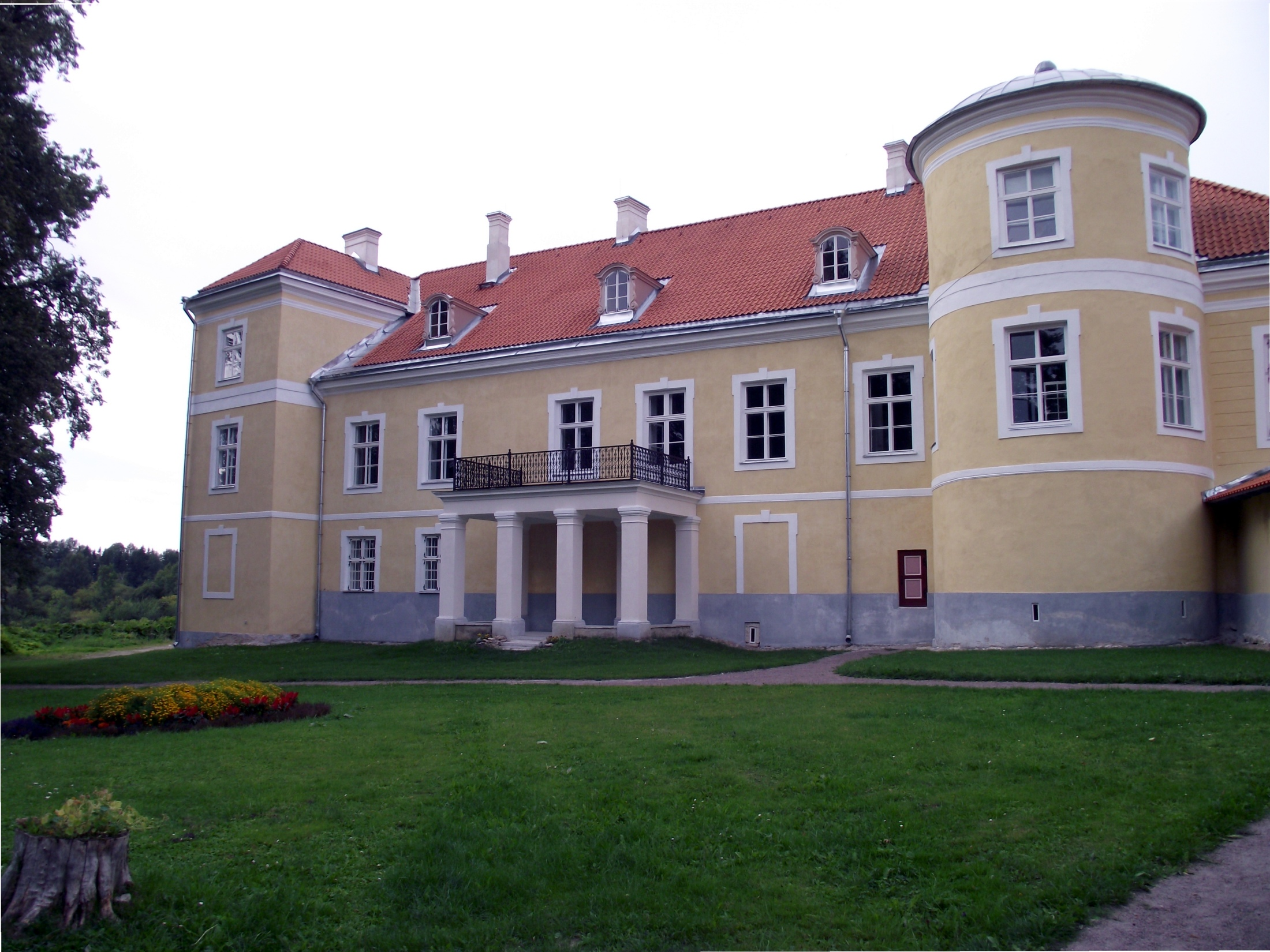 Kiltsi mõisa peahoone